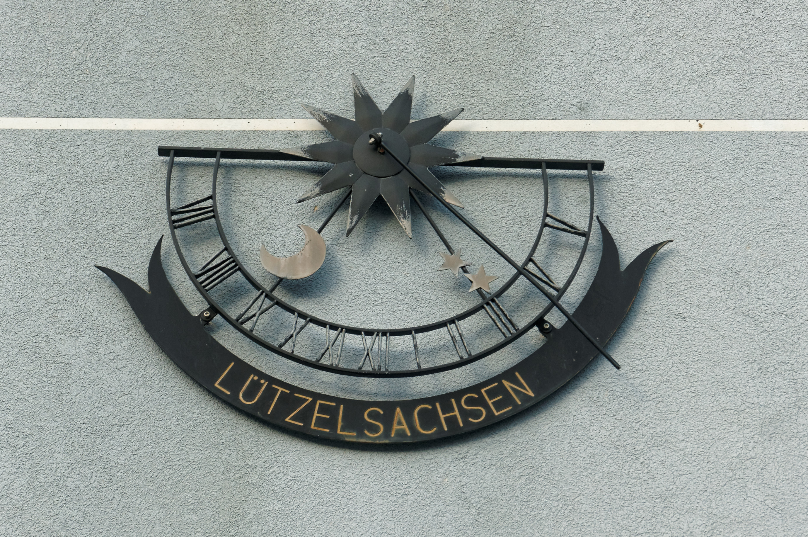 Horloge rappelant le jumelage avec Lützelsachsen